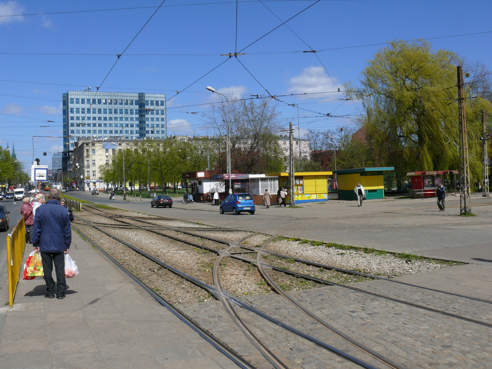 Plac Niepodległości w Łodzi